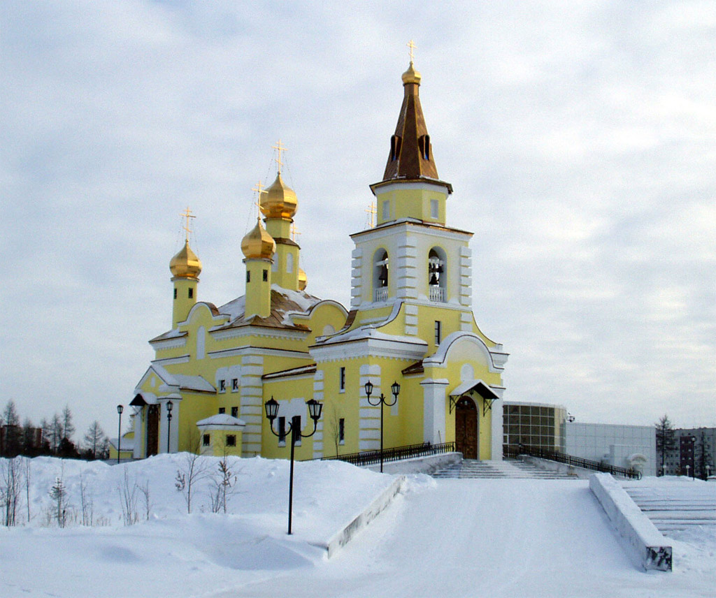 Chrám svatého Mikuláše v Nadymu v Jamalskoněneckém autonomním okruhu